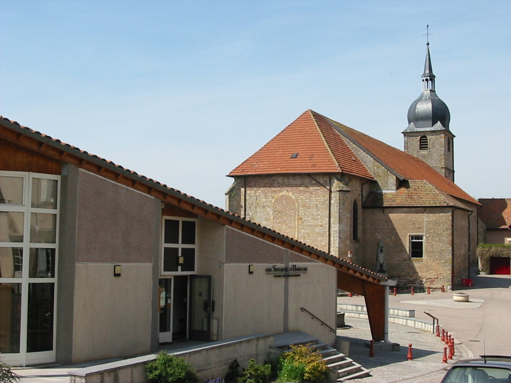 Deneuvre (Meurthe-et-Moselle). Le musée Les Sources d'Hercule. L'église Saint-Remy.